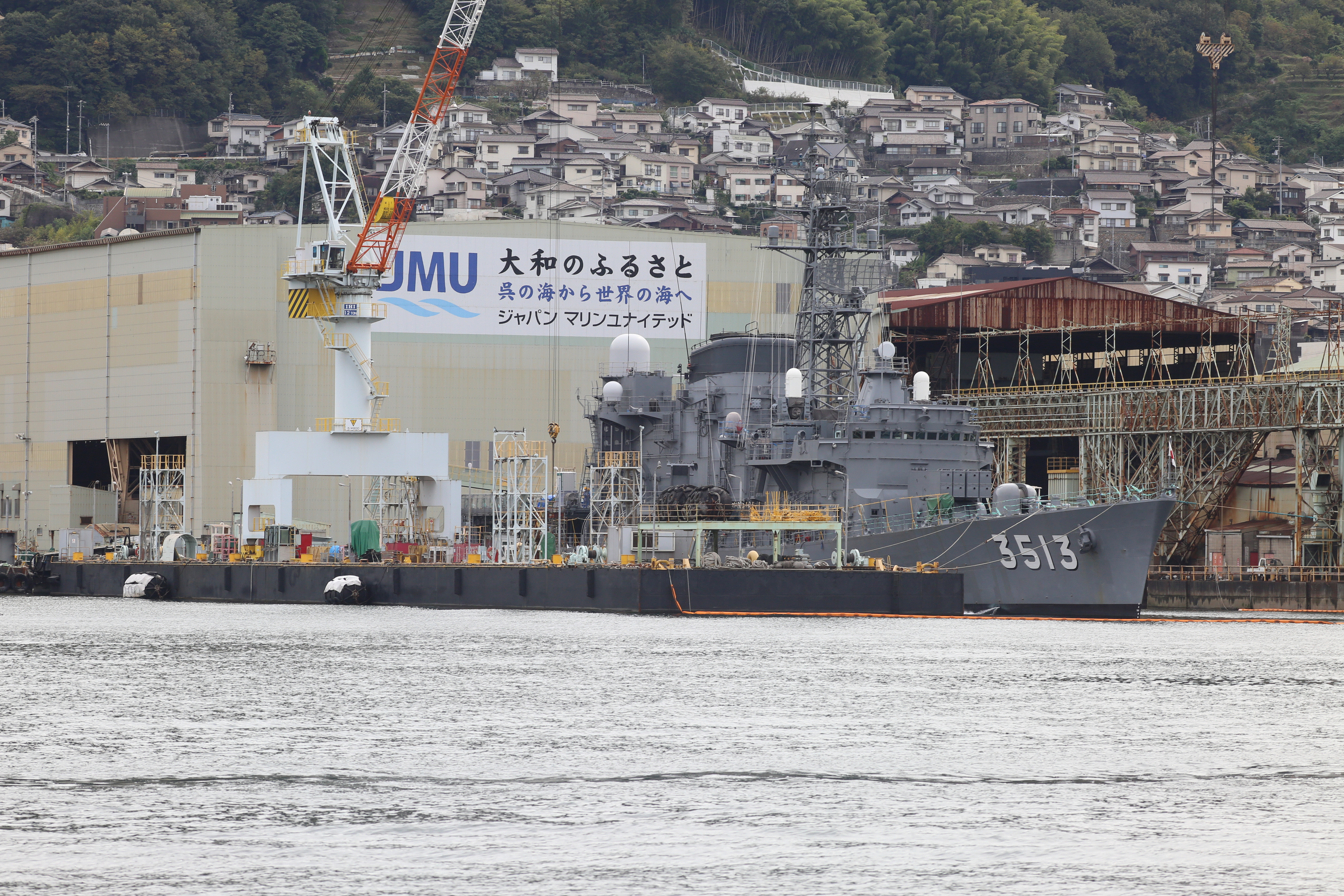 練習艦「しまゆき」とジャパン マリンユナイテッド呉工場